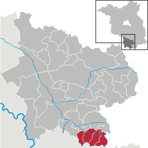 Amt Schradenland in Brandenburg (Country) - District Elbe-Elster